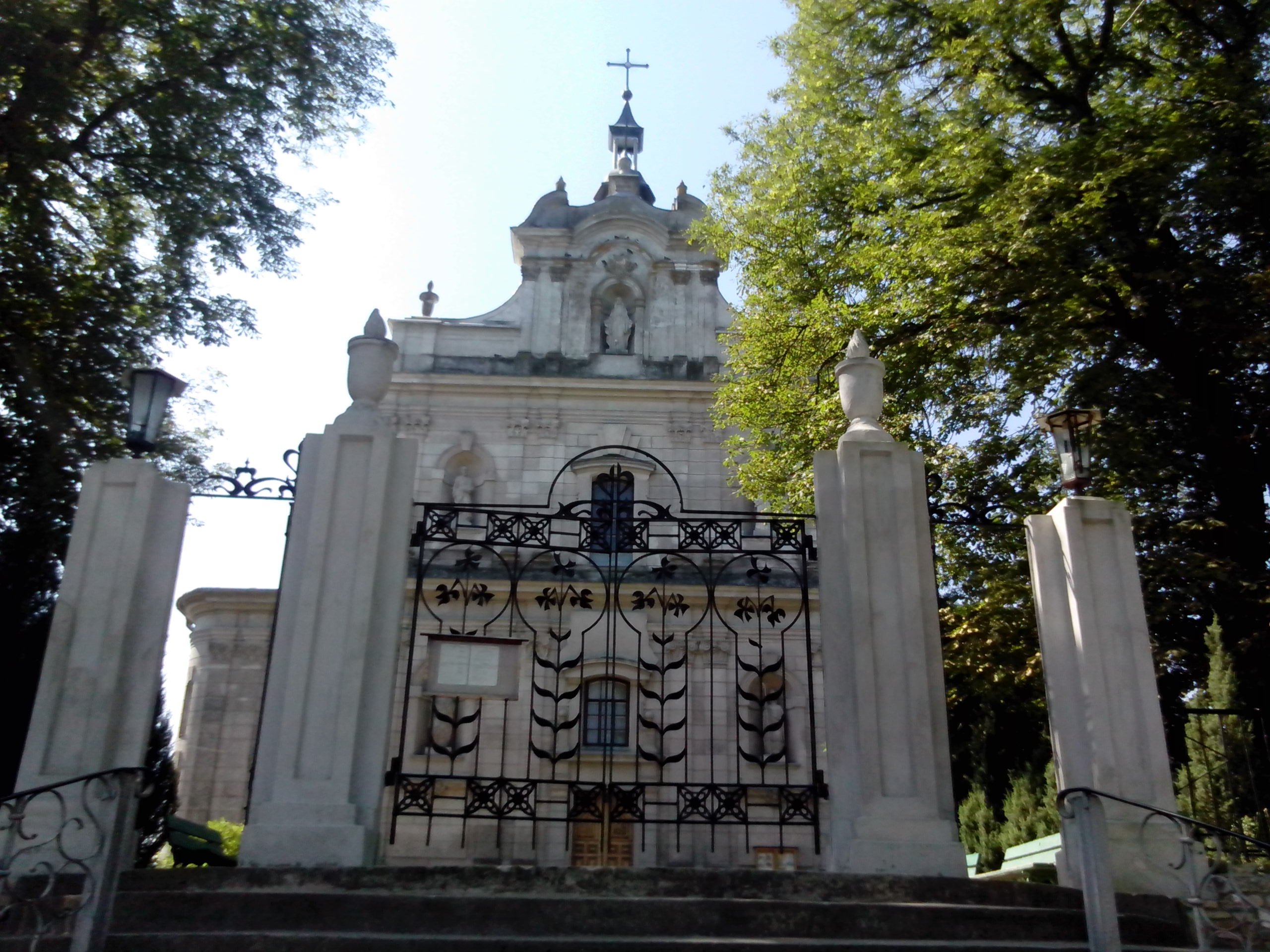 Костел святого Войцеха у с. Гвардійське.